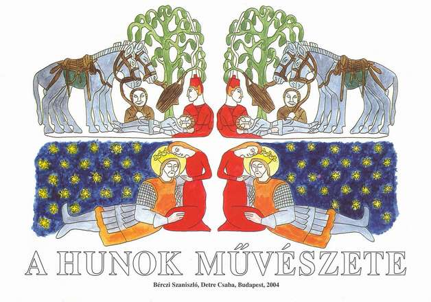 Hun művészeti alkotás az Ermitázsból és párhuzama